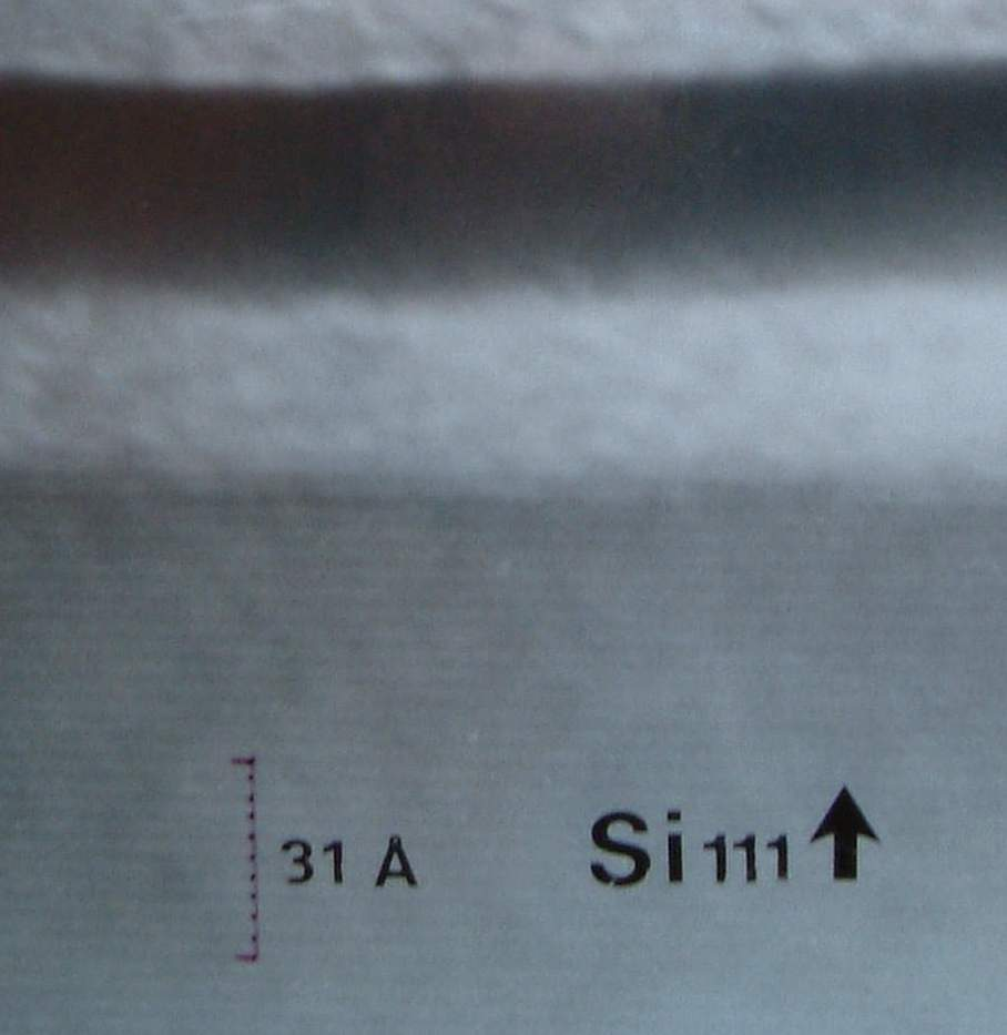 photo obtenue par microscopie électronique réalisée par Yves Lepêtre